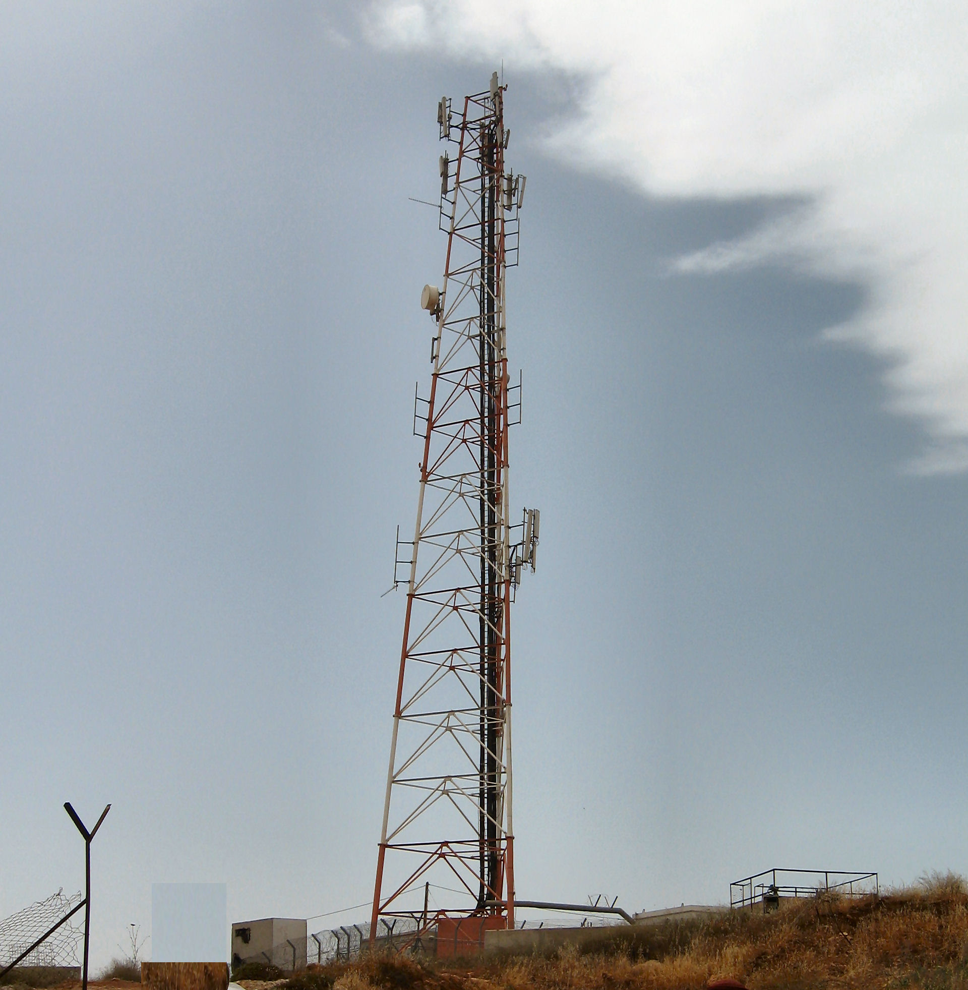 MOUNT_KIDA